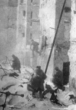 Streetfight inside Stalingrad.